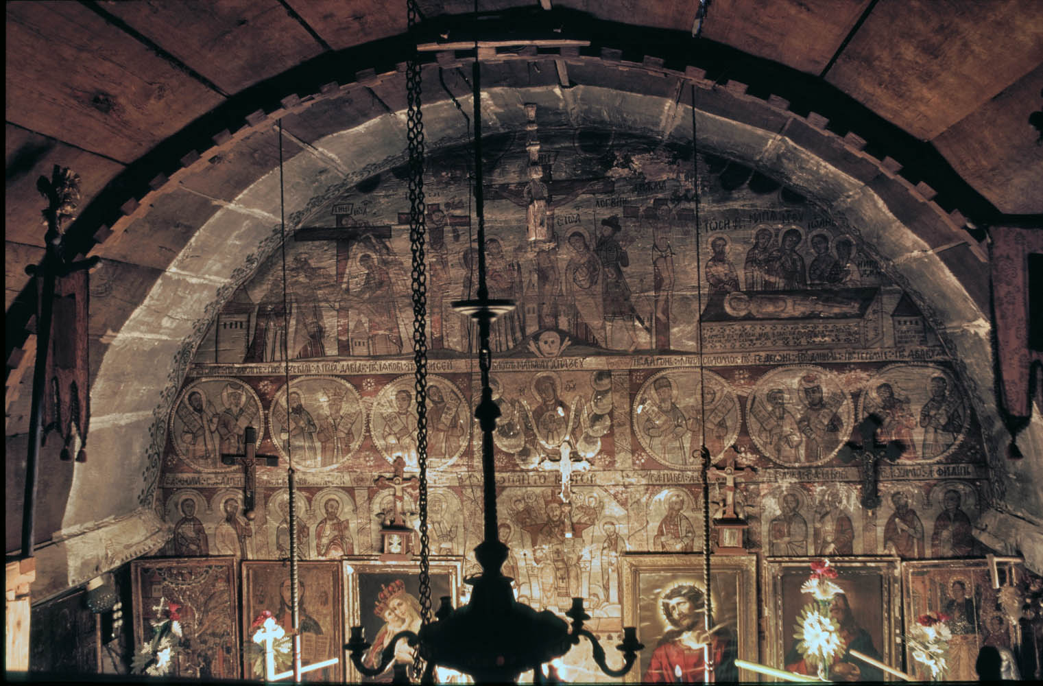 Tâmpla/catapeteasma bisericii de lemn din Sârbi Susani, Maramureş. Pictată 1760 de Alexandru Ponehalschi. Foto: Alexandru Baboş, primăvara 1995.